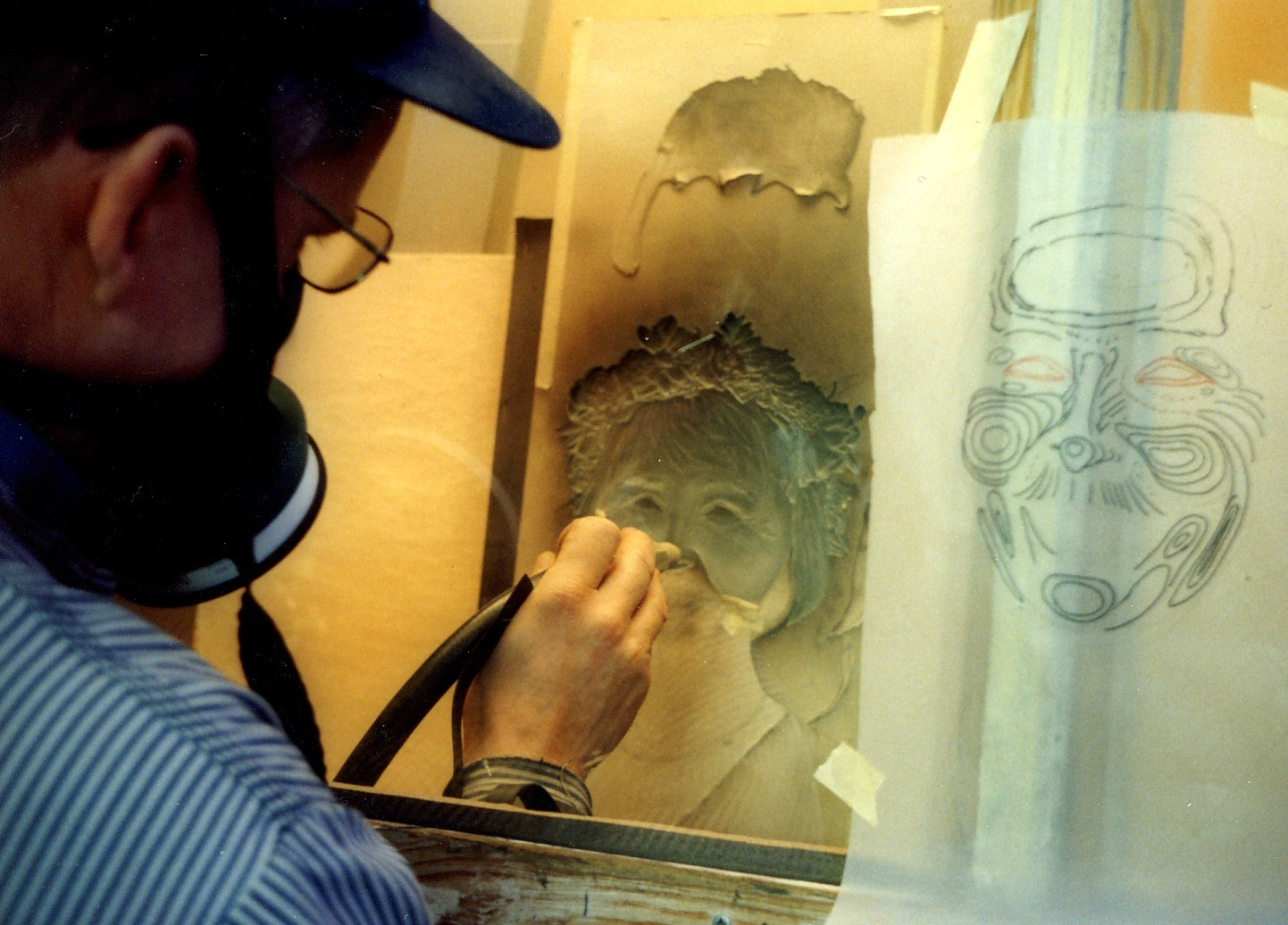 Peter Sitell, djupblästring av ett porträtt